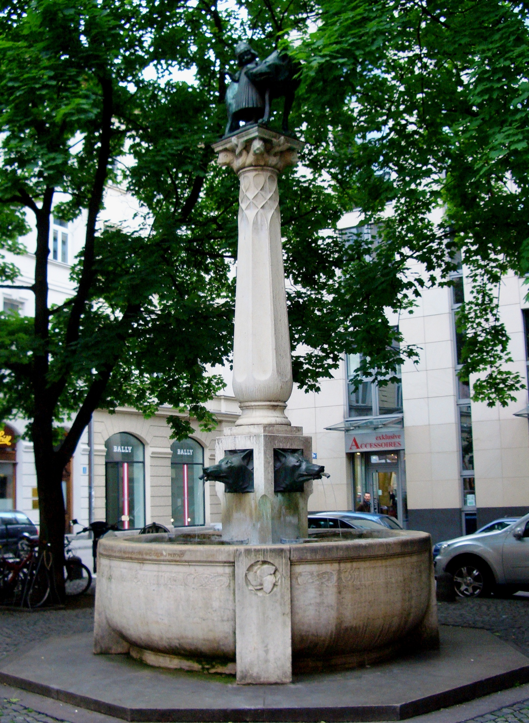 Wolfsbrunnen, auch Rotkaeppchenbrunnen von Heinrich Duell und Georg Pezold in Muenchen-Altstadt